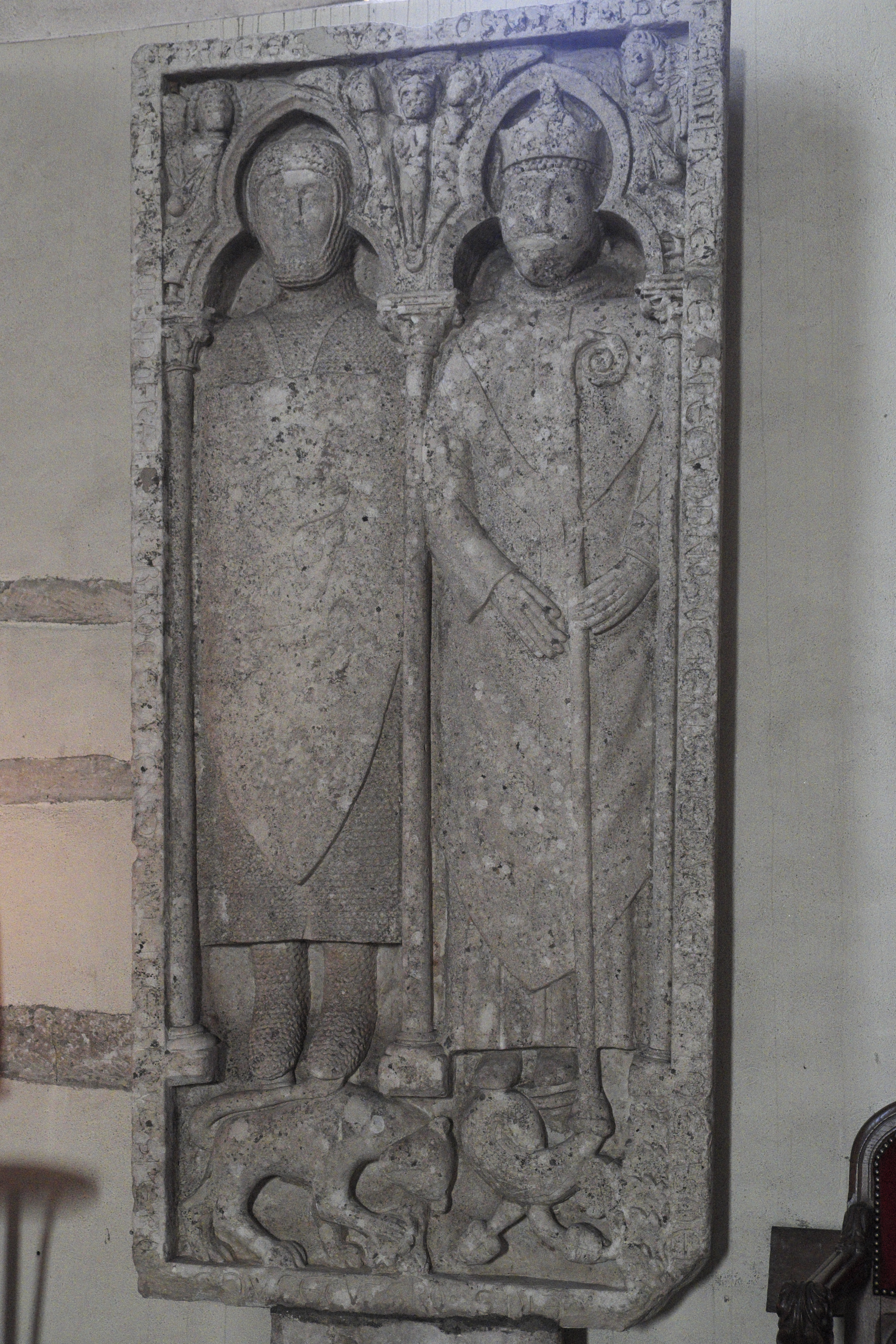 Katholische Pfarrkirche Saint-Martin in Malesherbes im Département Loiret (Centre-Val de Loire/Frankreich), Grabplatte eines Ritters und eines Abtes aus dem 13. Jahrhundert